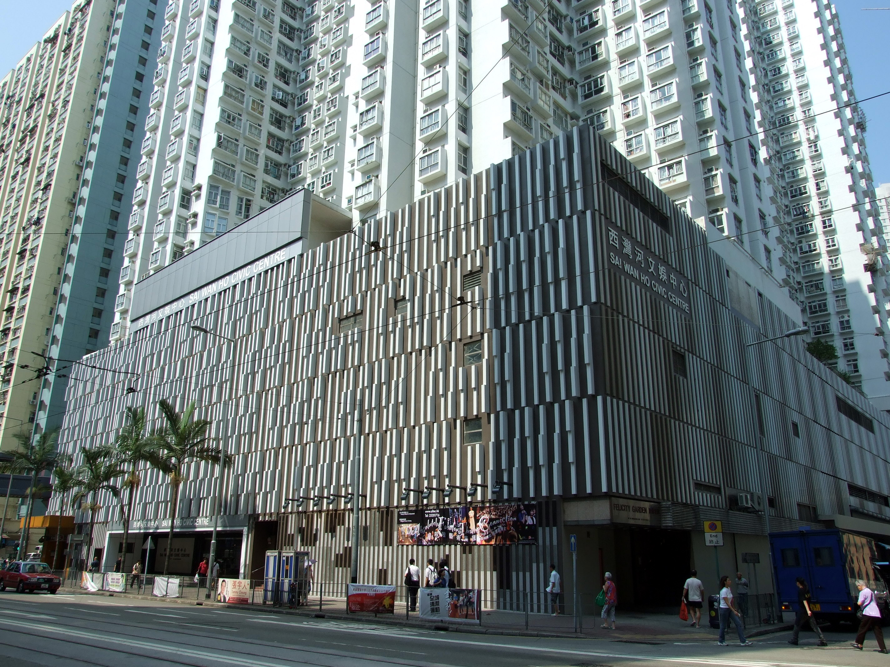 中文（香港）: 西灣河文娛中心